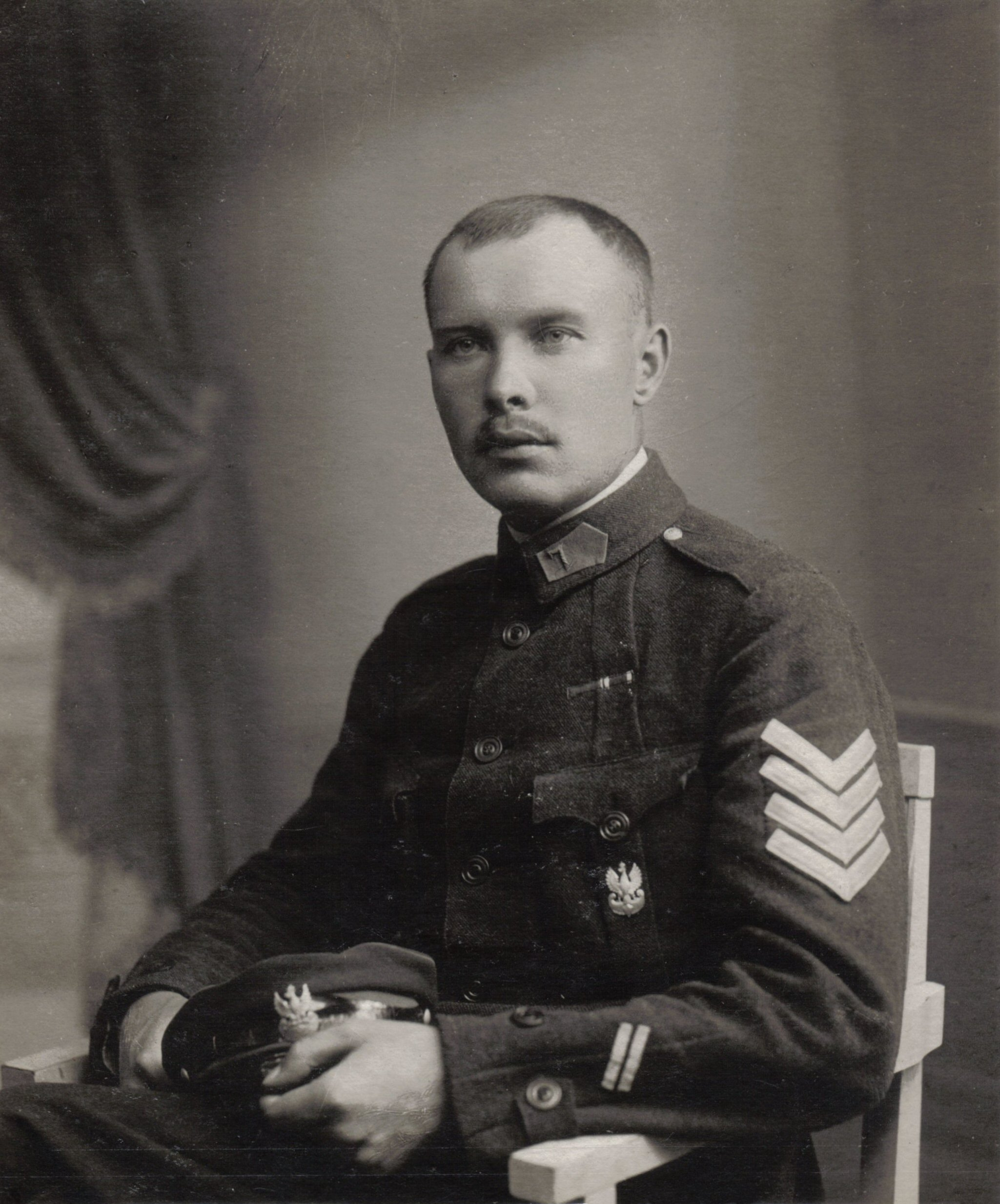 Porucznik Stanisław Franciszek Kobyliński w korpusie generała Dowbor-Muśnickiego w Bobrujsku. Korpus Dowbor-Muśnickiego zorganizowany został z tej części oficerów i żołnierzy polskich z armii rosyjskiej, którzy po rosyjskich rewolucjach 1917 roku nie zaangażowali się po stronie bolszewików. Dowbor-Muśnicki ogłosił neutralność Korpusu wobec wszystkich zwalczających się porewolucyjnych ugrupowań wojskowych. Ale będąc zaatakowany przez Gwardię Czerwoną, odparł atak, zdobył twierdzę w Bobrujsku i tam pozostał do czasu oddania przez bolszewików Bobrujska Niemcom. Korpus został przez Niemców rozbrojony, a wyszkoleni w nim oficerowie i żołnierze stanowili istotną część powołanego wkrótce Wojska Polskiego i mieli, tak jak porucznik Stanisław Kobyliński, znaczący udział w wygranej w 1920 roku wojnie Polsko-Sowieckiej.